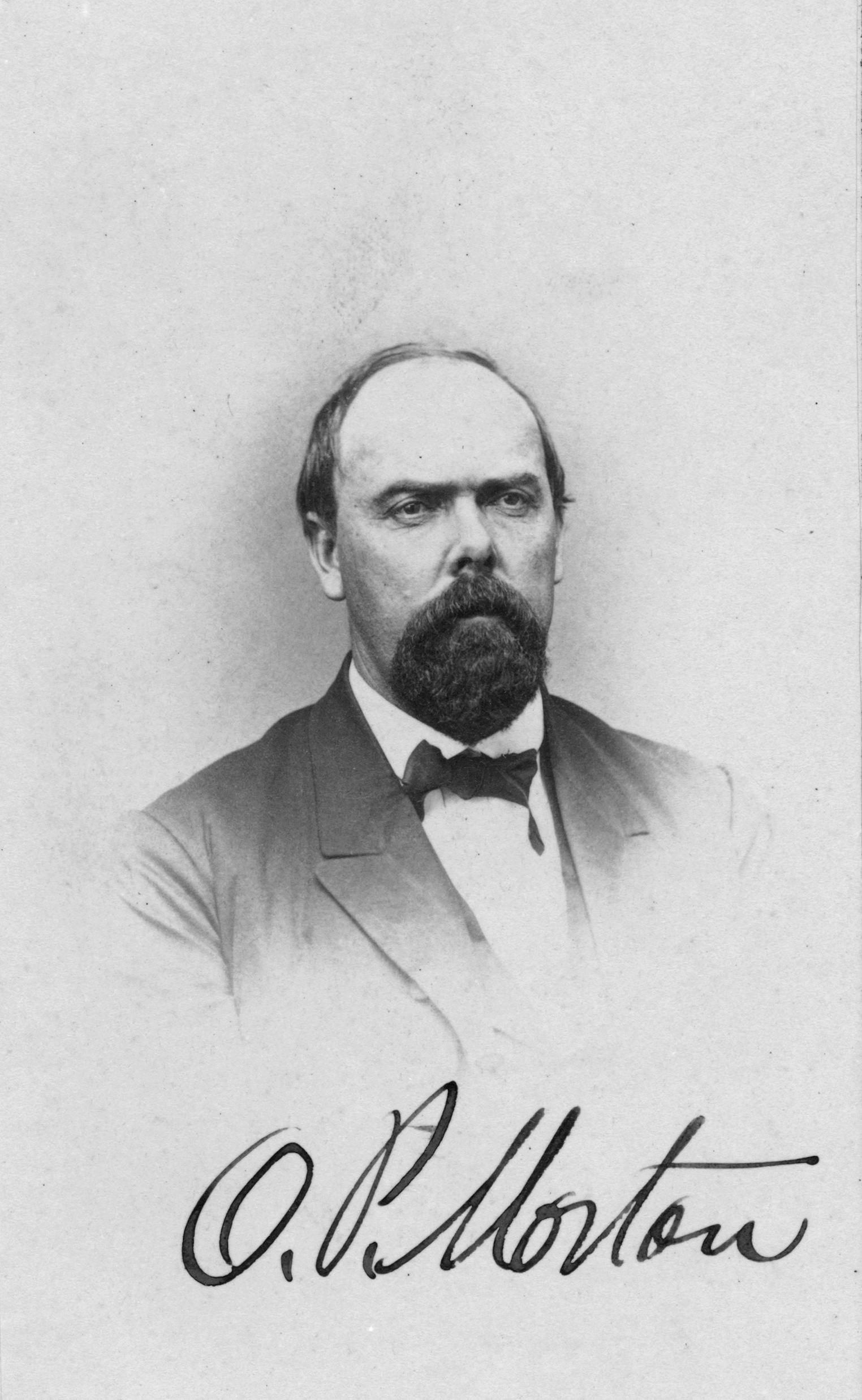 Oliver Hazard Perry Morton Sitter: Morton, Oliver P. (Oliver Perry), 1823-1877 Photographer: Brady National Photographic Art Gallery (Washington, D.C.) Reproduction Number: LC-MSS-44297-33-023 (b&w negative) Collection: James Wadsworth Family Papers Repository: Library of Congress Manuscript Division, Washington, D.C. 20540